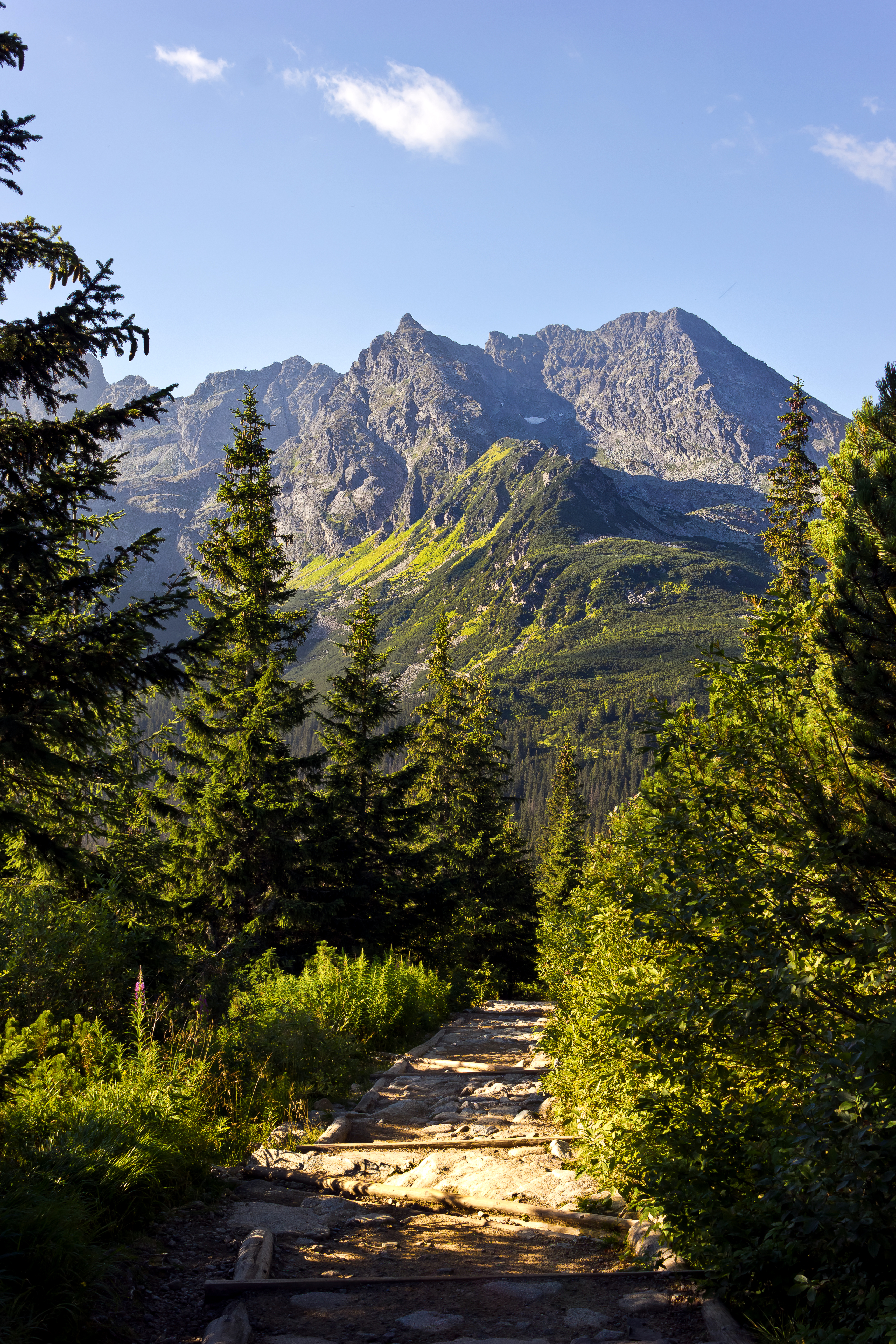 Obszar specjalnej ochrony ptaków Tatry. This is a photography of Natura 2000 protected area with ID PLC120001